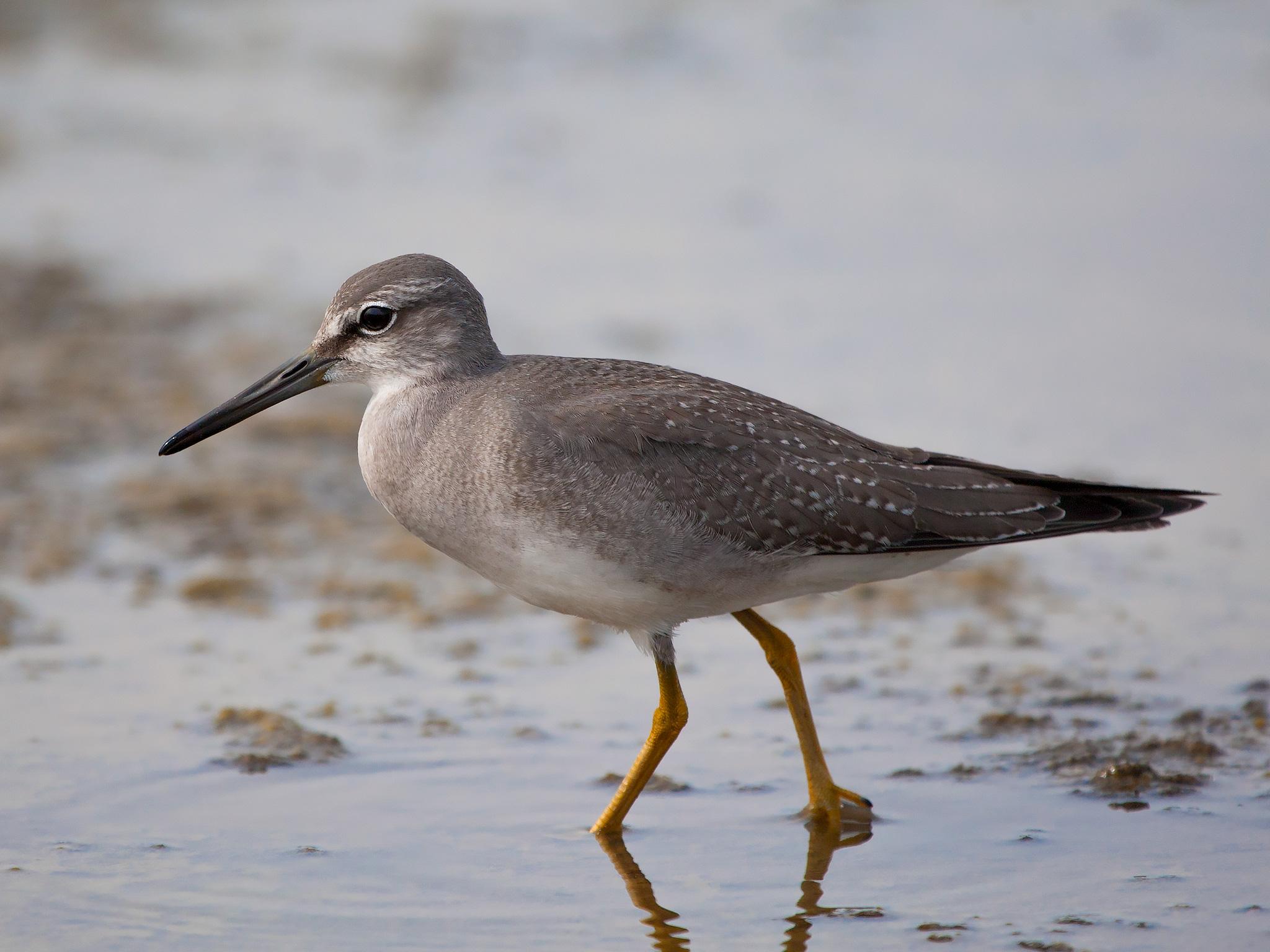 撮影地 北海道石狩市